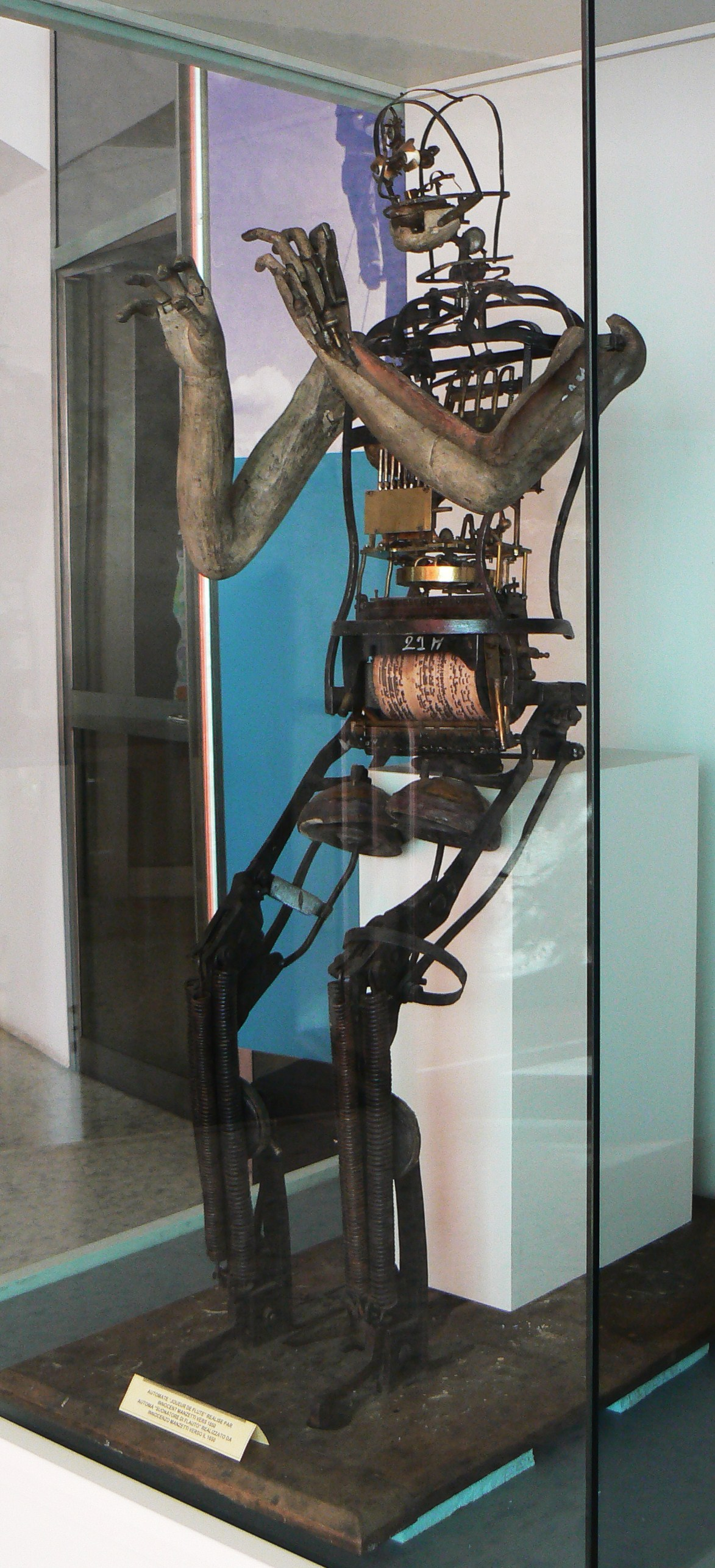 Il "Suonatore di flauto", l'automa realizzato da Innocenzo Manzetti nel 1840; esposto presso la Maison de Mosse di Avise (AO), Italia, in occasione della mostra "Au fil des ondes: 150 ans de télécommunications en Vallée d'Aoste", 9 - 17 aprile 2011; le "joueur de flûte" de Innocenzo Manzetti de 1840, exposé à la Maison de Mosse de Avise (AO), Italie, dans l'expo "Au fil des ondes: 150 ans de télécommunications en Vallée d'Aoste", 9 - 17 Avril 2011.